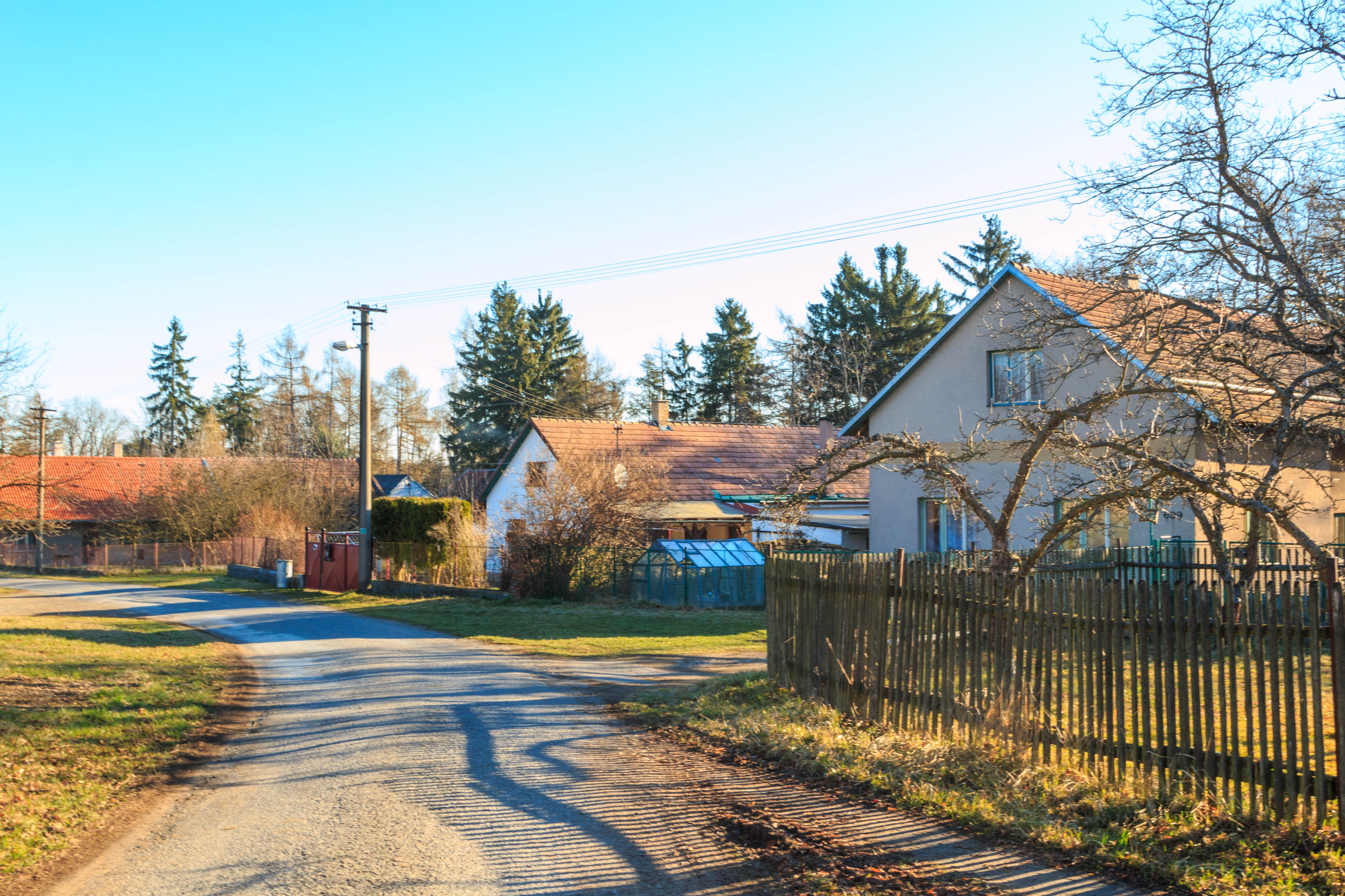 Nová Ves u Skutče - dům čp. 699